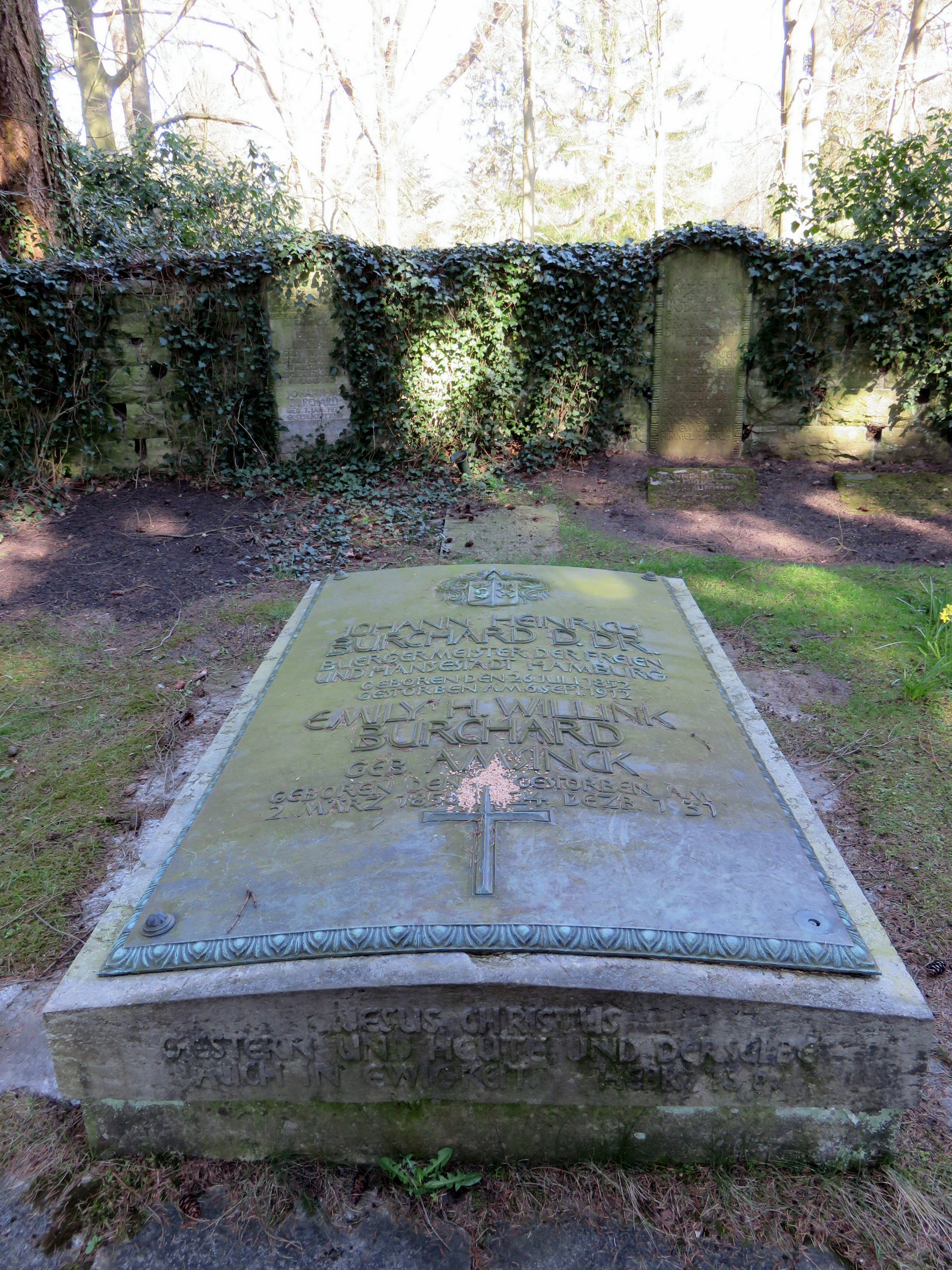 Burchard-Grabanlage, 1913/1915 errichtet von Fritz Schumacher (Entwurf) und Richard Kuöhl (Ausführung) auf dem Hamburger Friedhof Ohlsdorf, Planquadrat AA 16 (Nähe Nordteich und Stiller Weg).